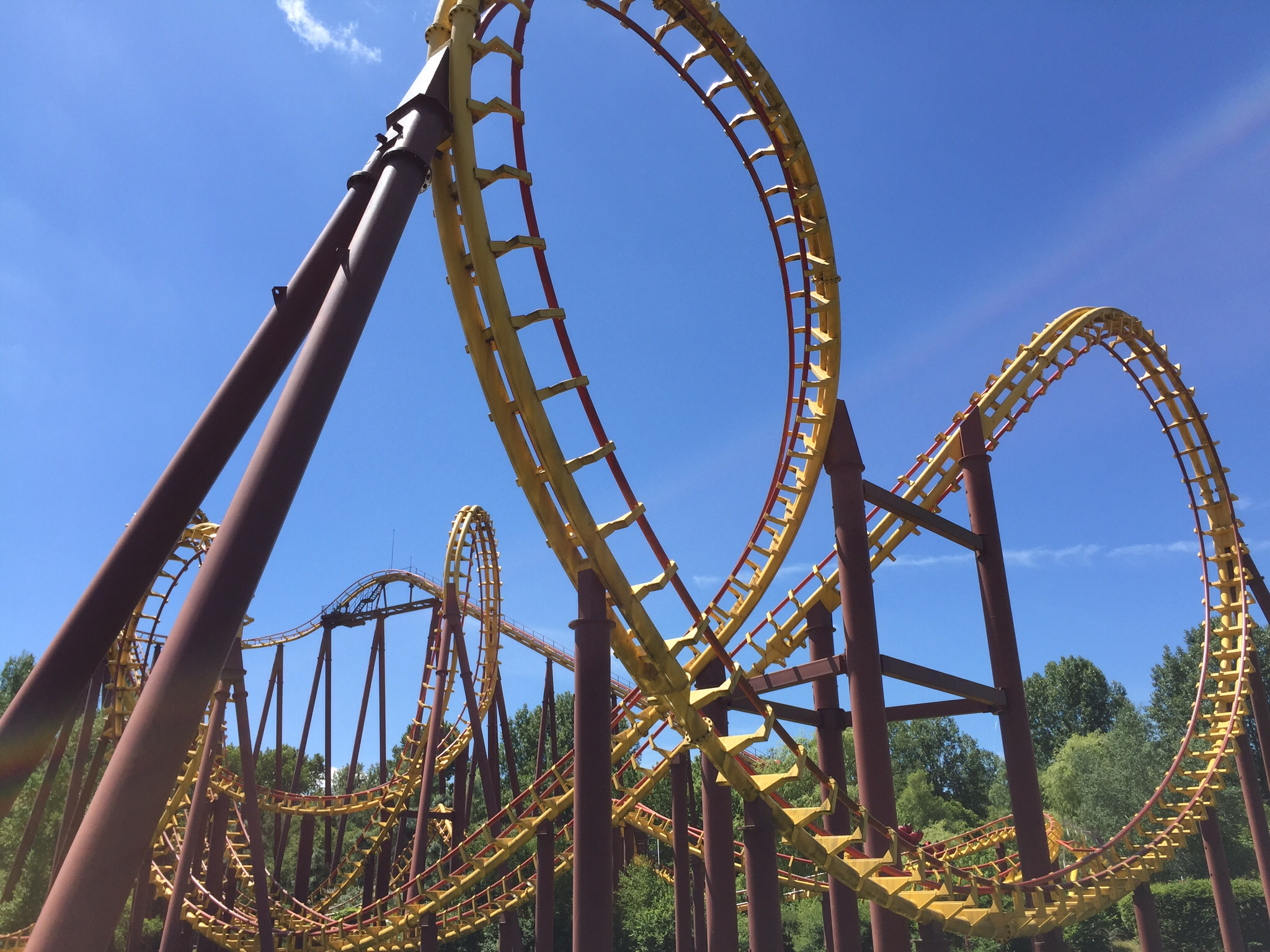 Inversion de type "Batwing " sur l'attraction Goudurix du Parc Astérix.